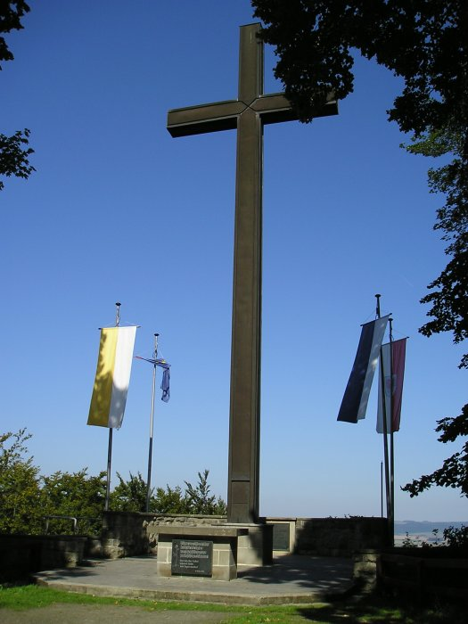 Dr.-Konrad-Martin-Kreuz auf dem Hülfensberg, Geismar, Landkreis Eichsfeld, Thüringen, Deutschland.